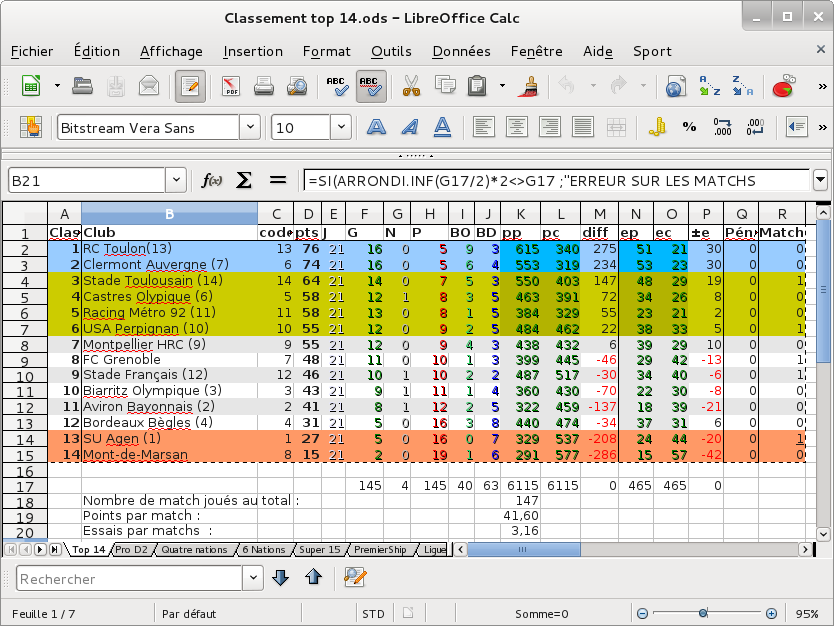 Capture d'écran du logiciel LibreOffice. Classement du championnat de France de Rugby à XV 2011-2012 à l'issue de la neuvième journée. This screenshot either does not contain copyright-eligible parts or visuals of copyrighted software, or the author has released it under a free license (which should be indicated beneath this notice), and as such follows the licensing guidelines for screenshots of Wikimedia Commons. You may use it freely according to its particular license. Free software license: GDFL Note: if the screenshot shows any work that is not a direct result of the program code itself, such as a text or graphics that are not part of the program, the license for that work must be indicated separately.